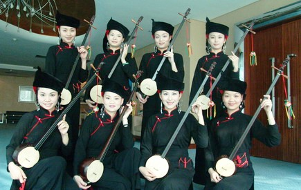 2009年10月17日上午9:17分由我本人摄于龙州板池美人村，现提供给世界人民免费使用，充分欣赏美丽的壮族女性。